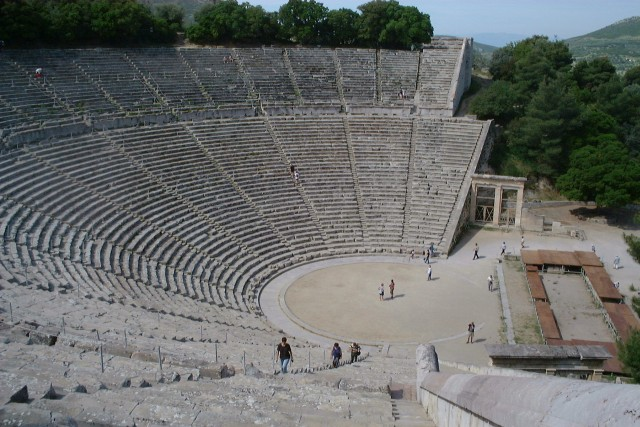 Teatro griego en Epidauro Greece, Epidauros - ancient theatre.